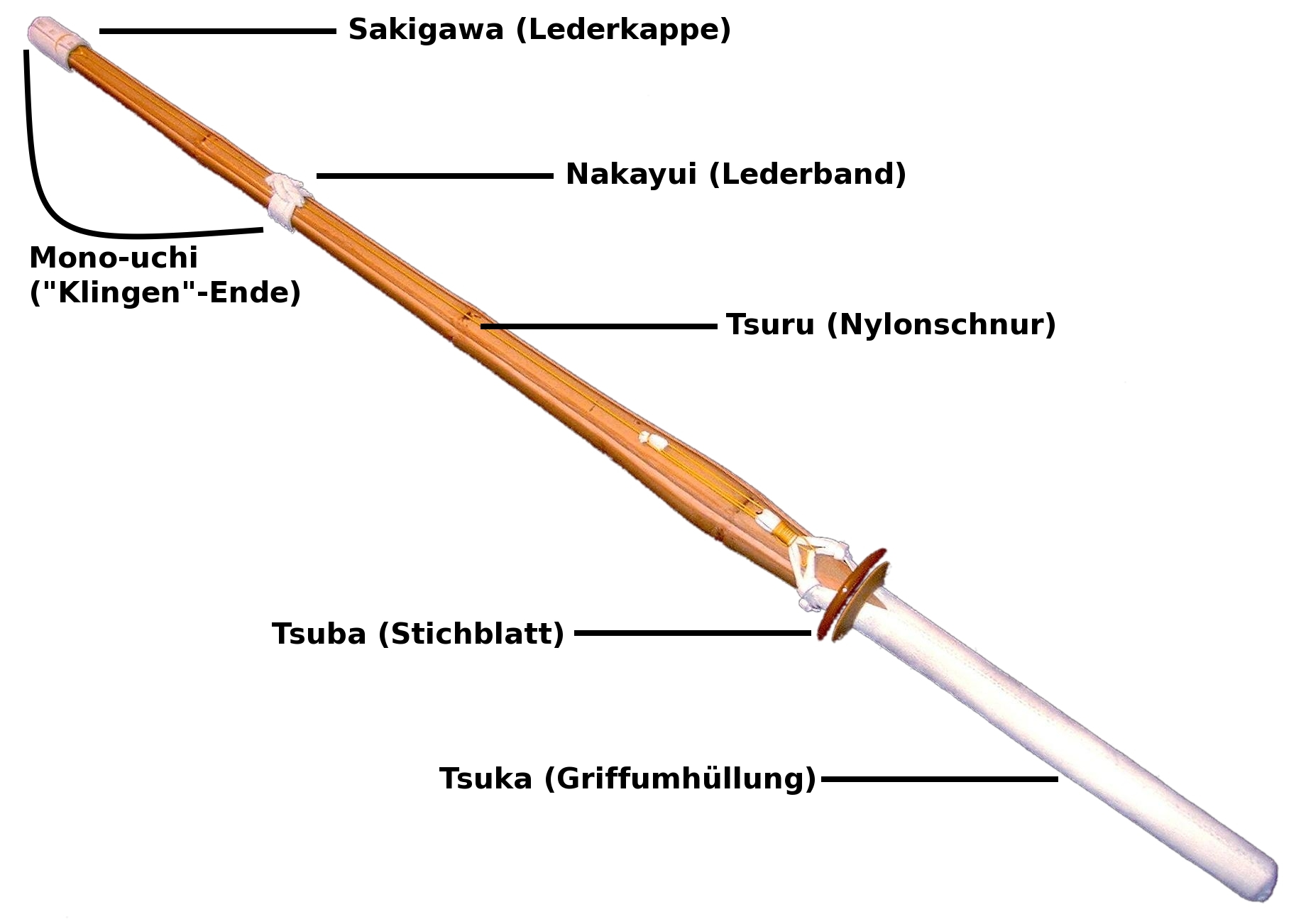 Teile des Shinai (Bambusstock)